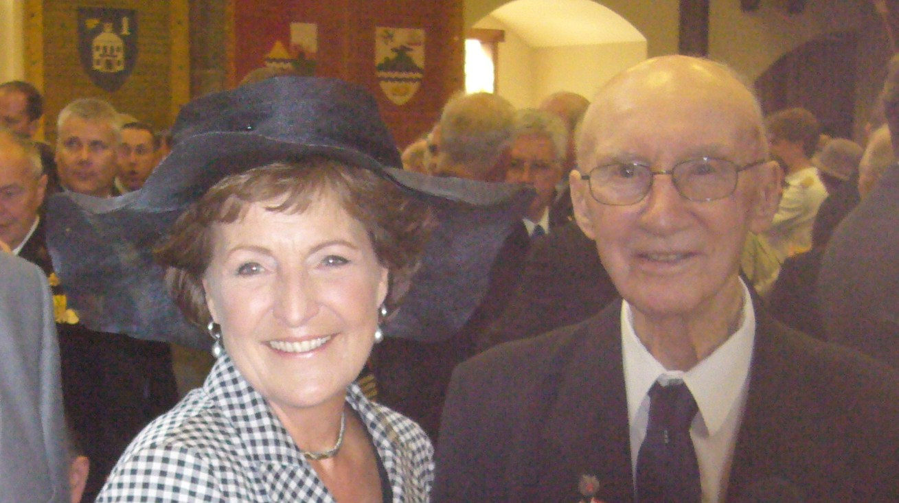 Wilfred Kirk en Prinses Margriet op de receptie na het uitreiken van de MWN aan Marco Kroon